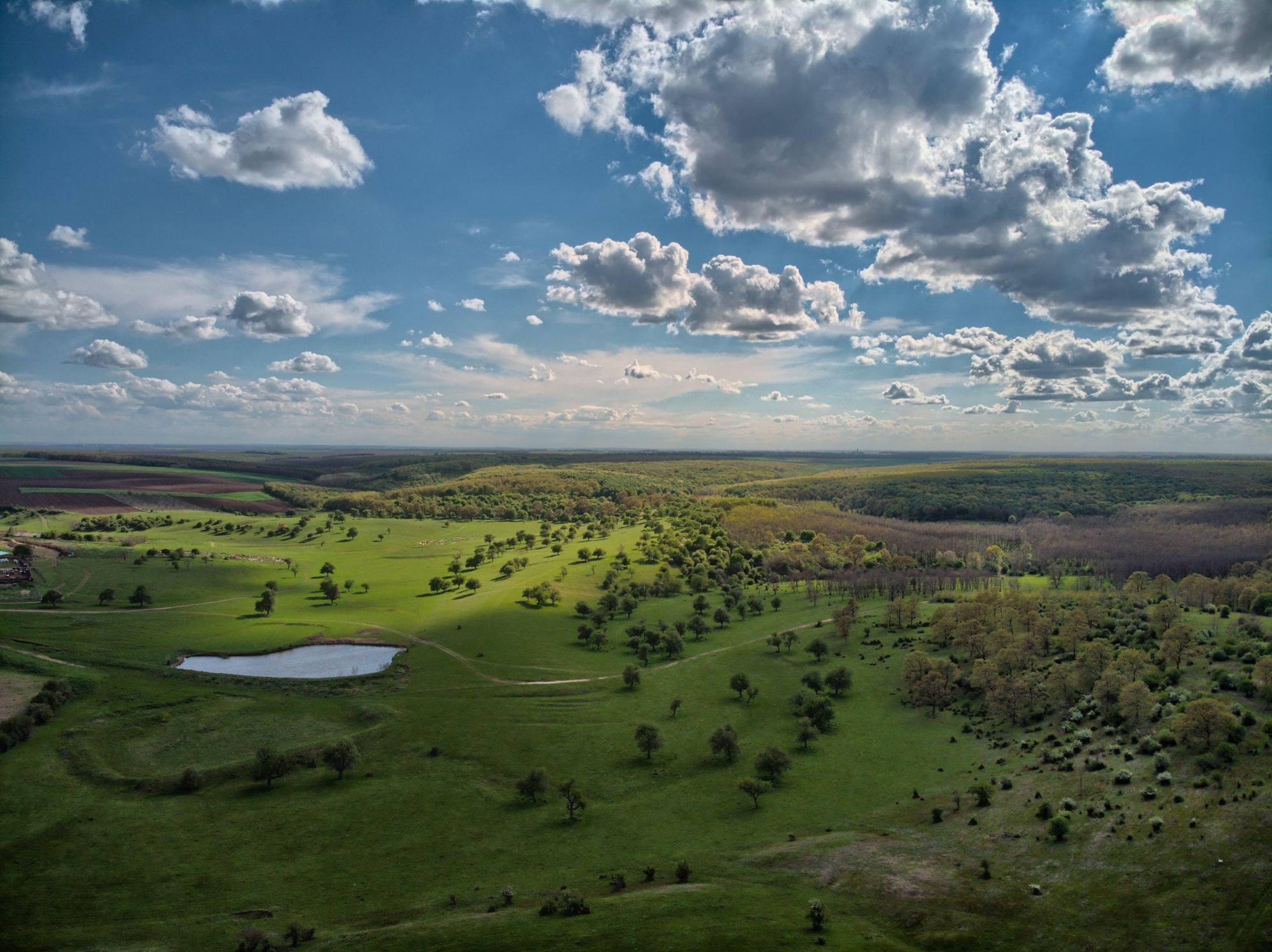 Listets